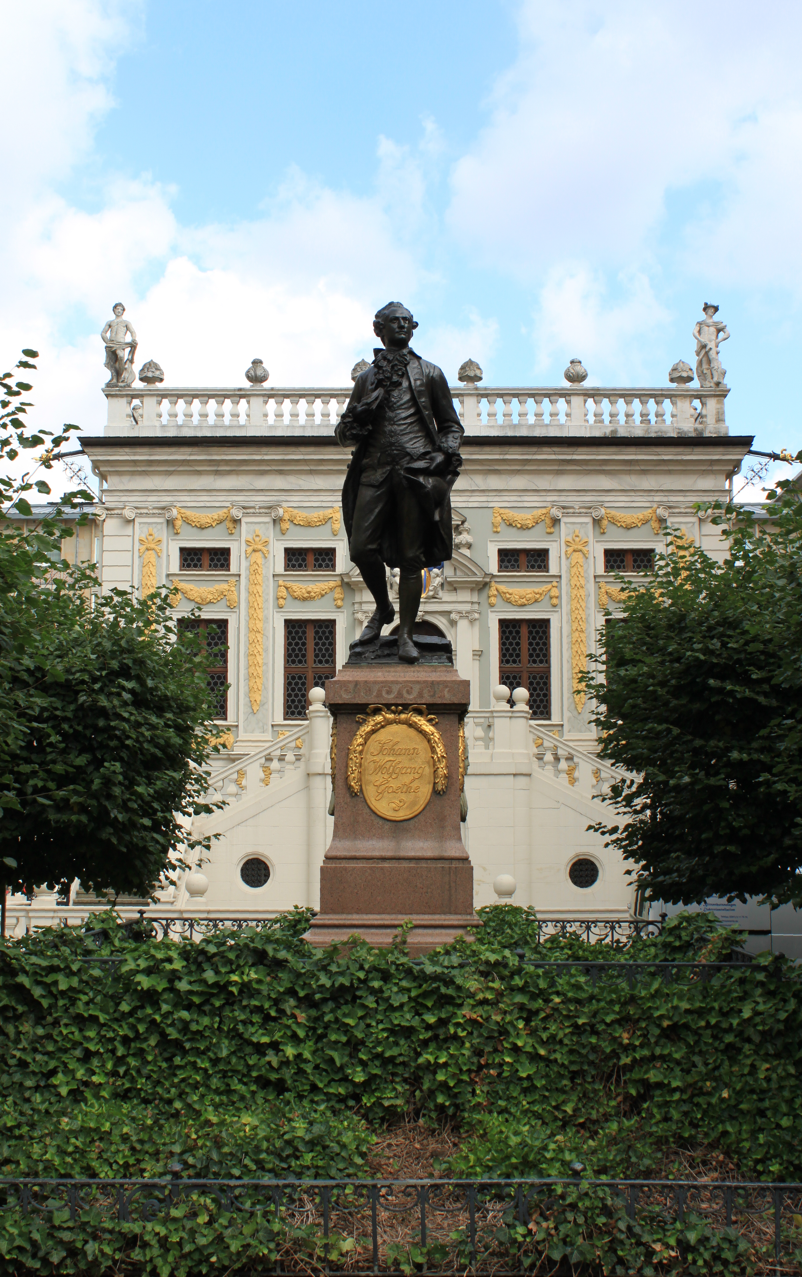 Leipzig - Goethe-Denkmal vor der Alten Handelsbörse